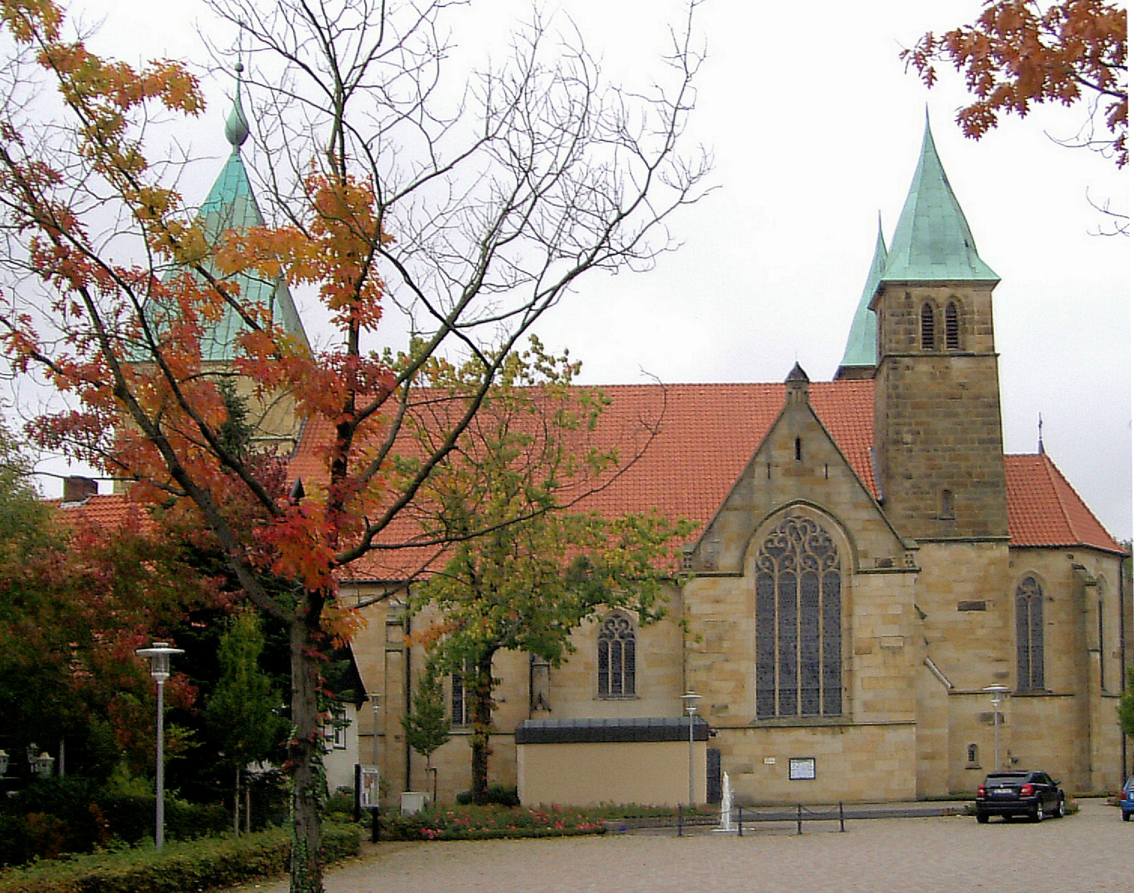 Pfarrkirche St. Johannes Baptist in Bösensell